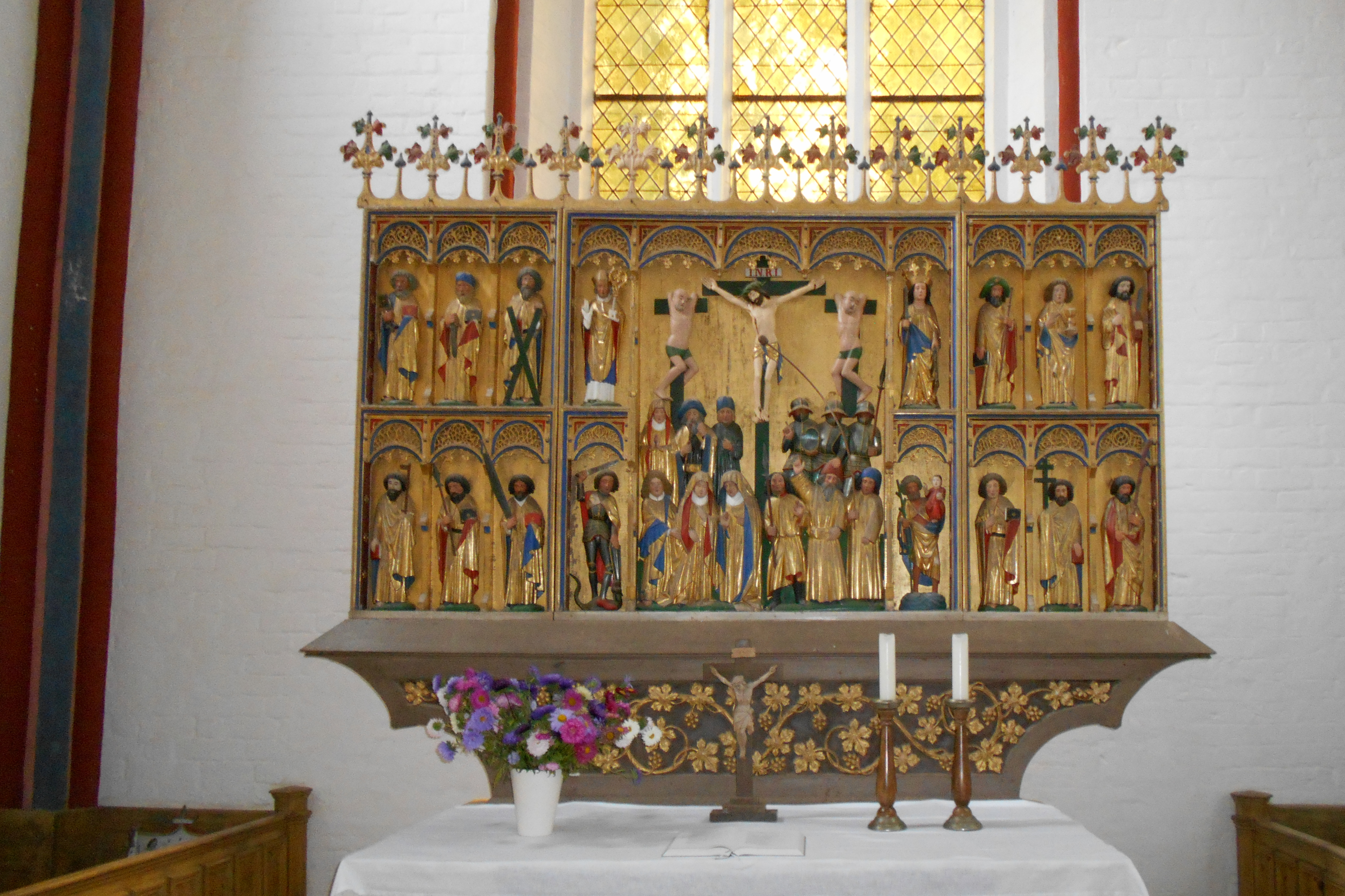 Hauptaltarretabel der Dorfkirche Reinshagen Landkreis Rostock